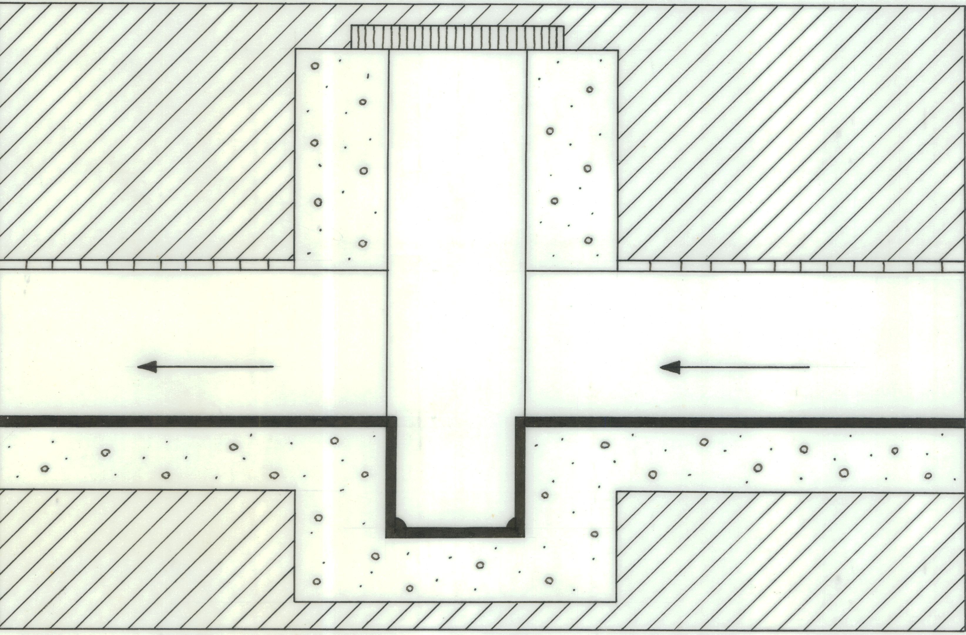 Planarchiv der Kantonsarchäologie Aargau Tote römische Wasserleitung von Vindonissa Überarbeitung schematischer Profilzeichnungen Keine Autorenangabe Einstiegsschacht, schematische Darstellung; eingerichtet für Kontrolle und Reinigung dienten; senkrechter Kamin mit rechteckigem oder quadratischem Querschnitt; an der Oberfläche mit Kalksteinplatten zugedeckt Archivierungsdatum: 19. 10. 1998 Vgl. Frontinus-Gesellschaft: Die Wasserversorgung Antiker Städte, Band 3, 2. Aufl. 1994, S. 54, Abb. 4